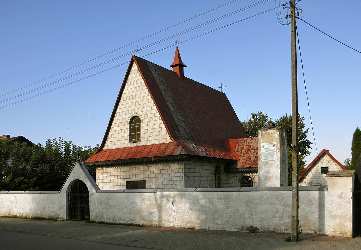 Kościół starokatolicki pw. Przemienienia Pańskiego.